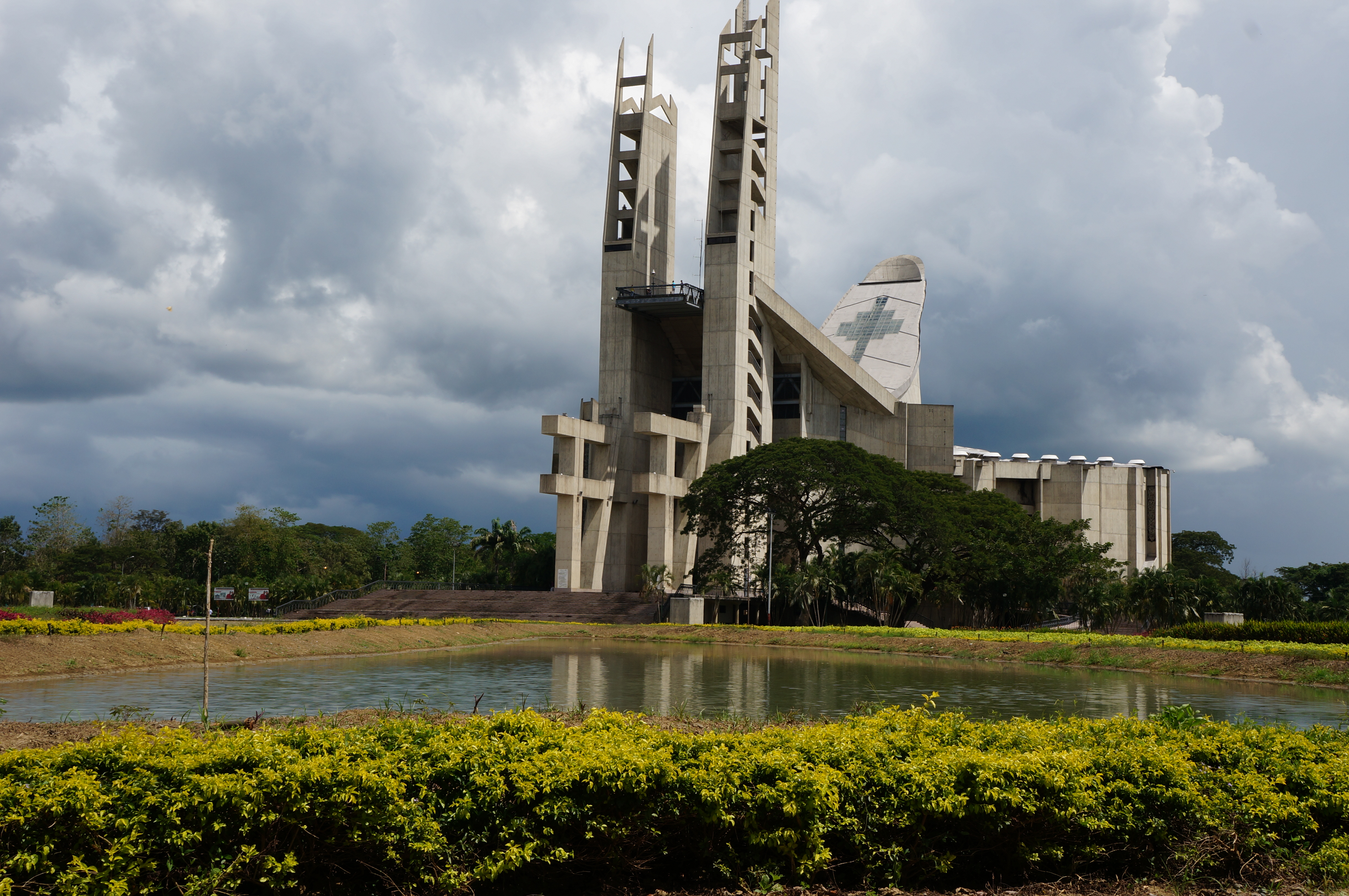 Santuario Virgen de Coromoto, Guanare Estado Portuguesa